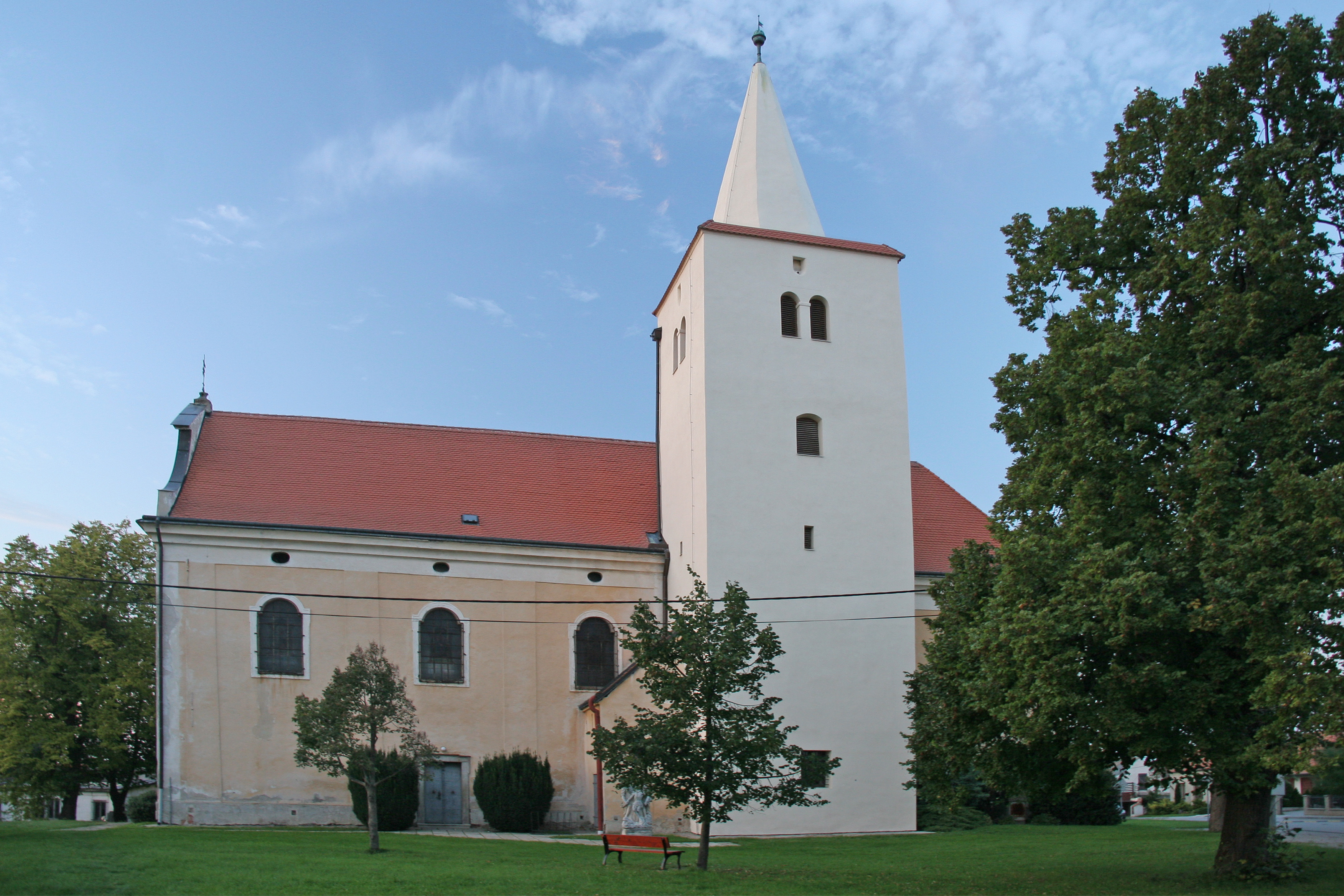 Kostel svatého Jana Křtitele, Vrbovec.